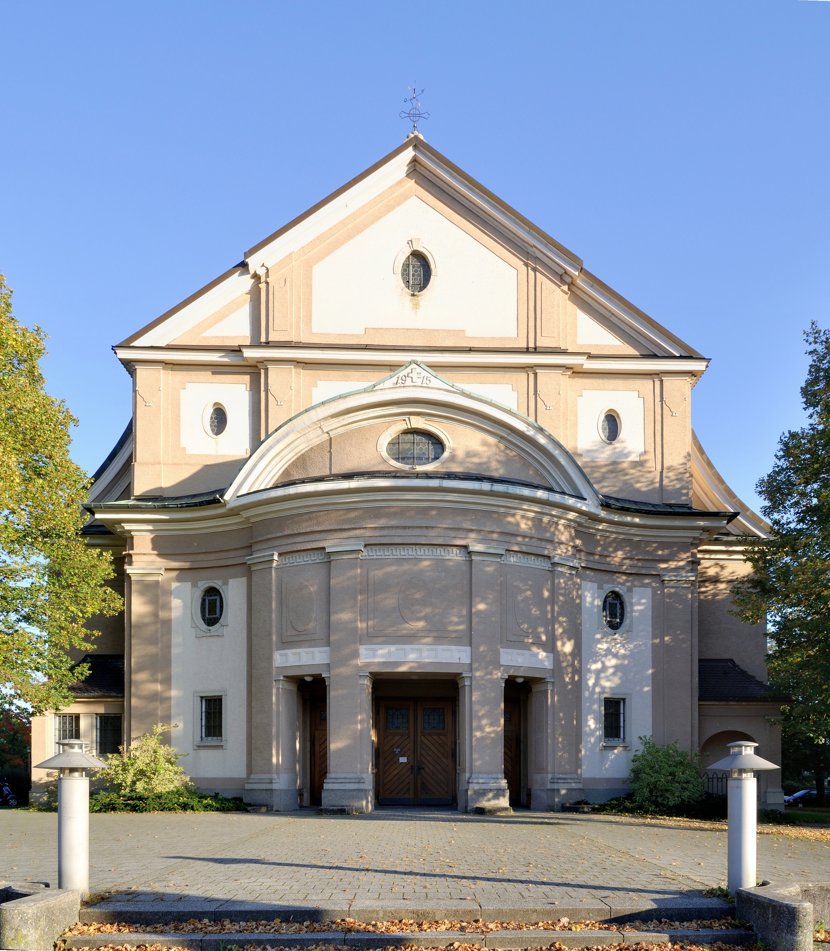 Rheinfelden: St. Josef, Hauptportal